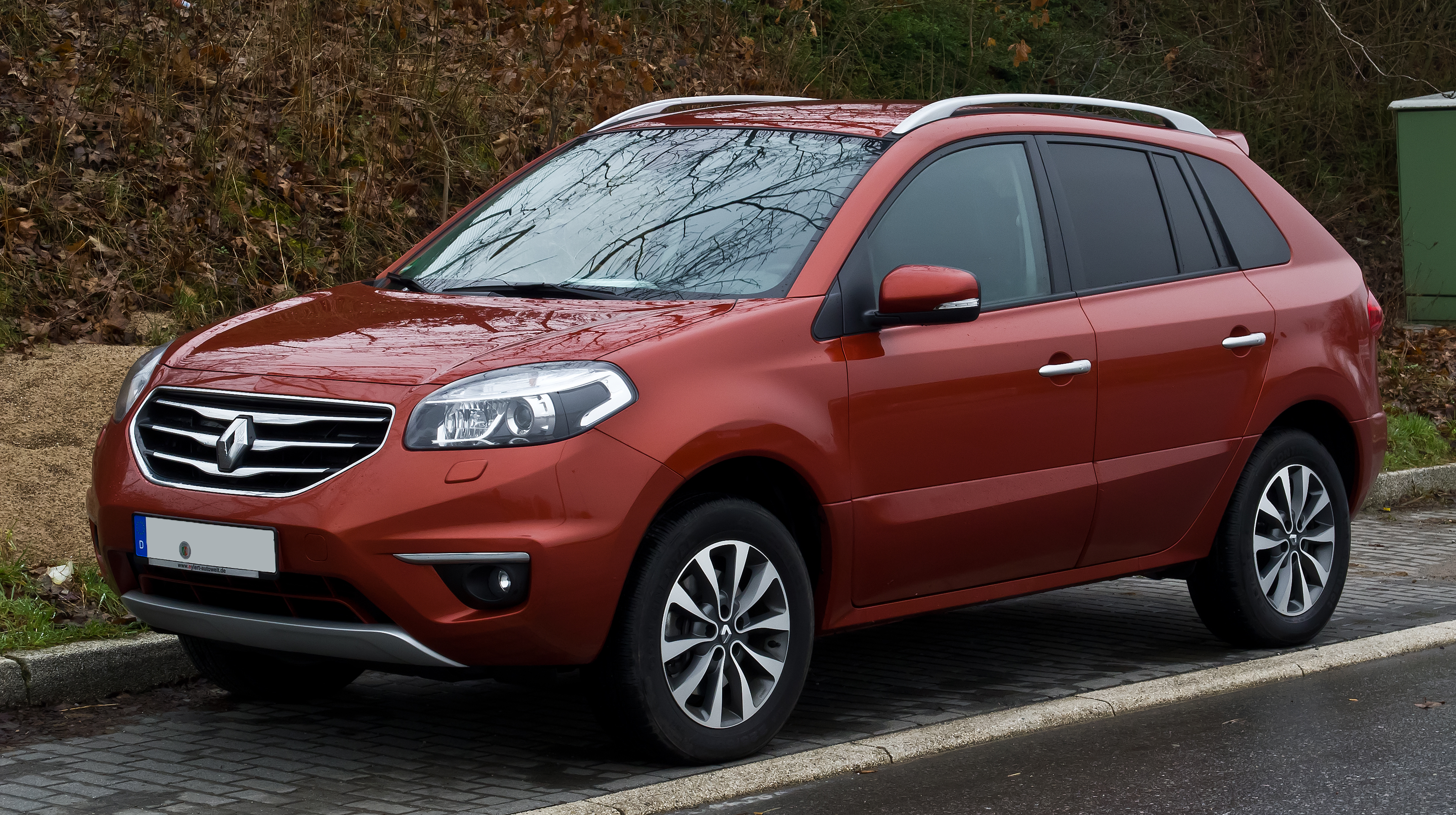 Renault Koleos Dynamique dCi 150 (Facelift)